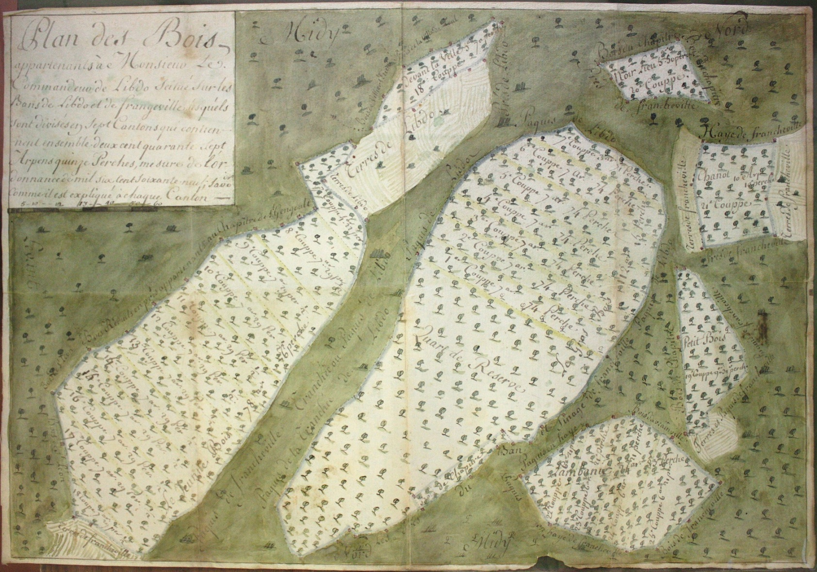 Détails d'un plan terrier de la Commanderie de Libdeau à Toul selon l'ordonnance de 1669